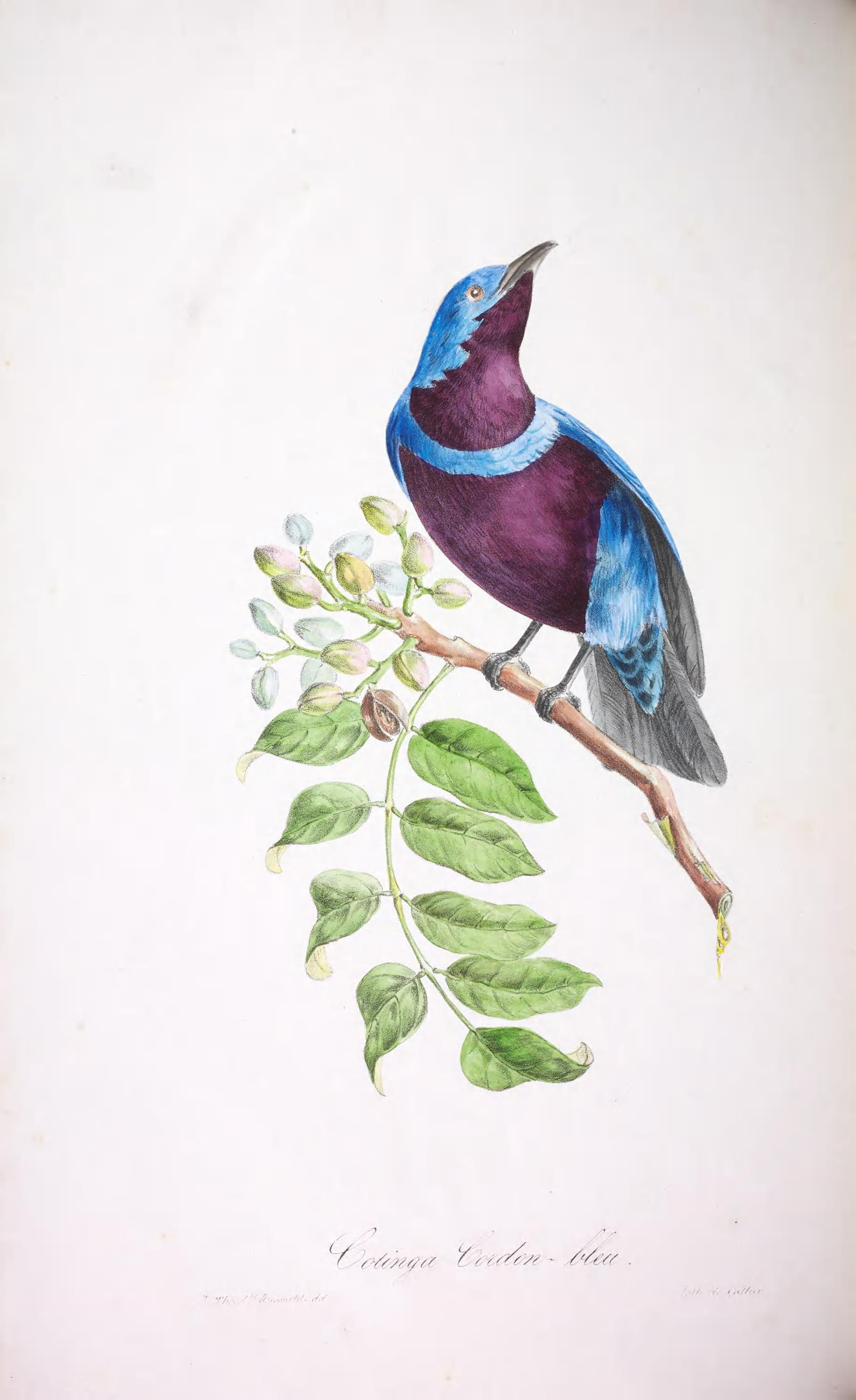 Oiseaux brillans du Brésil.